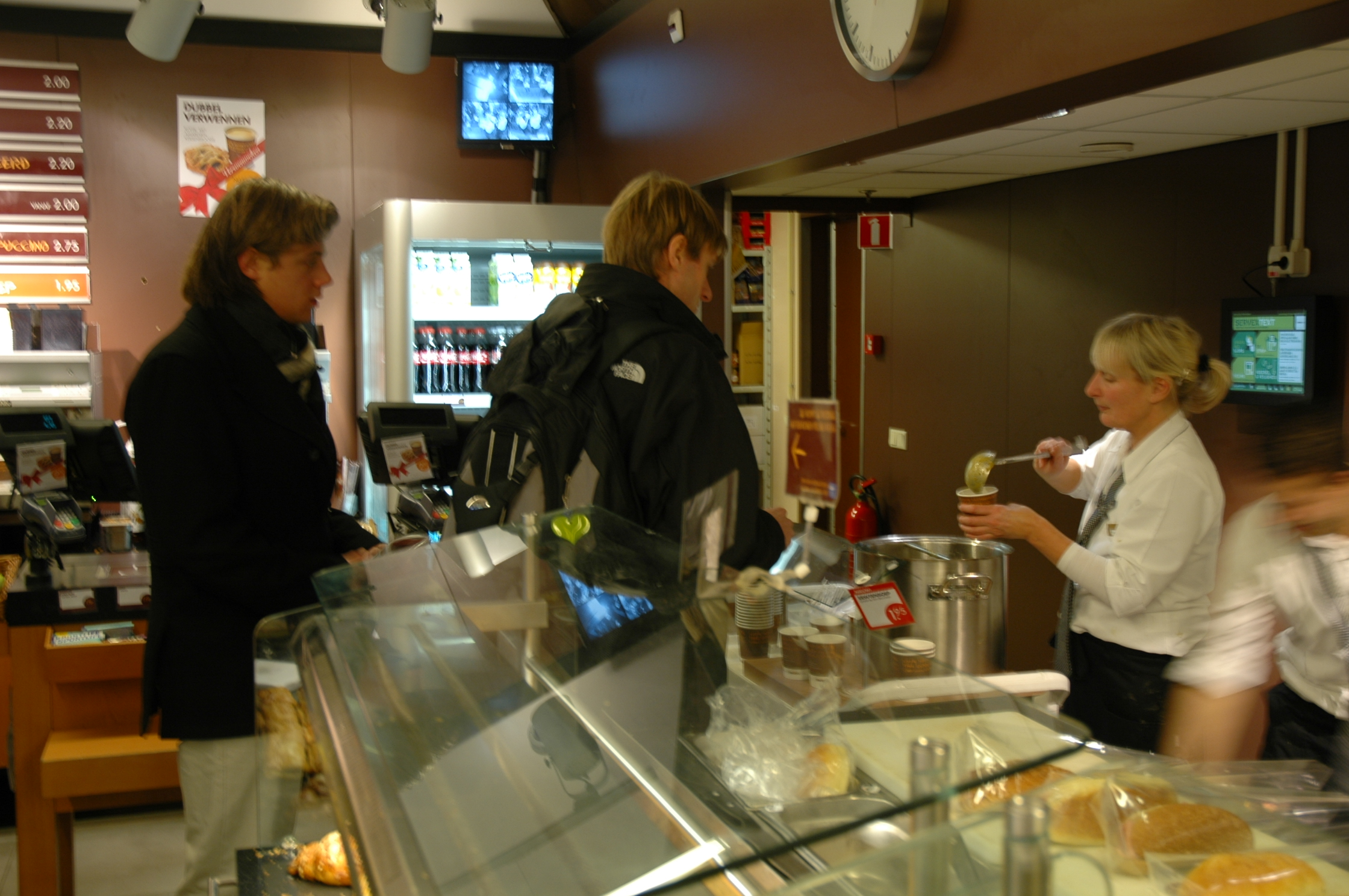 Erwtensoep bij de Brooodzaak. Als extra service wordt aan reizigers gratis erwtensoep verstrekt bij de Brooodzaak.Uit het dossier seizoenen, over de invloed van het weer op de dienstregeling van de Nederlandse Spoorwegen.